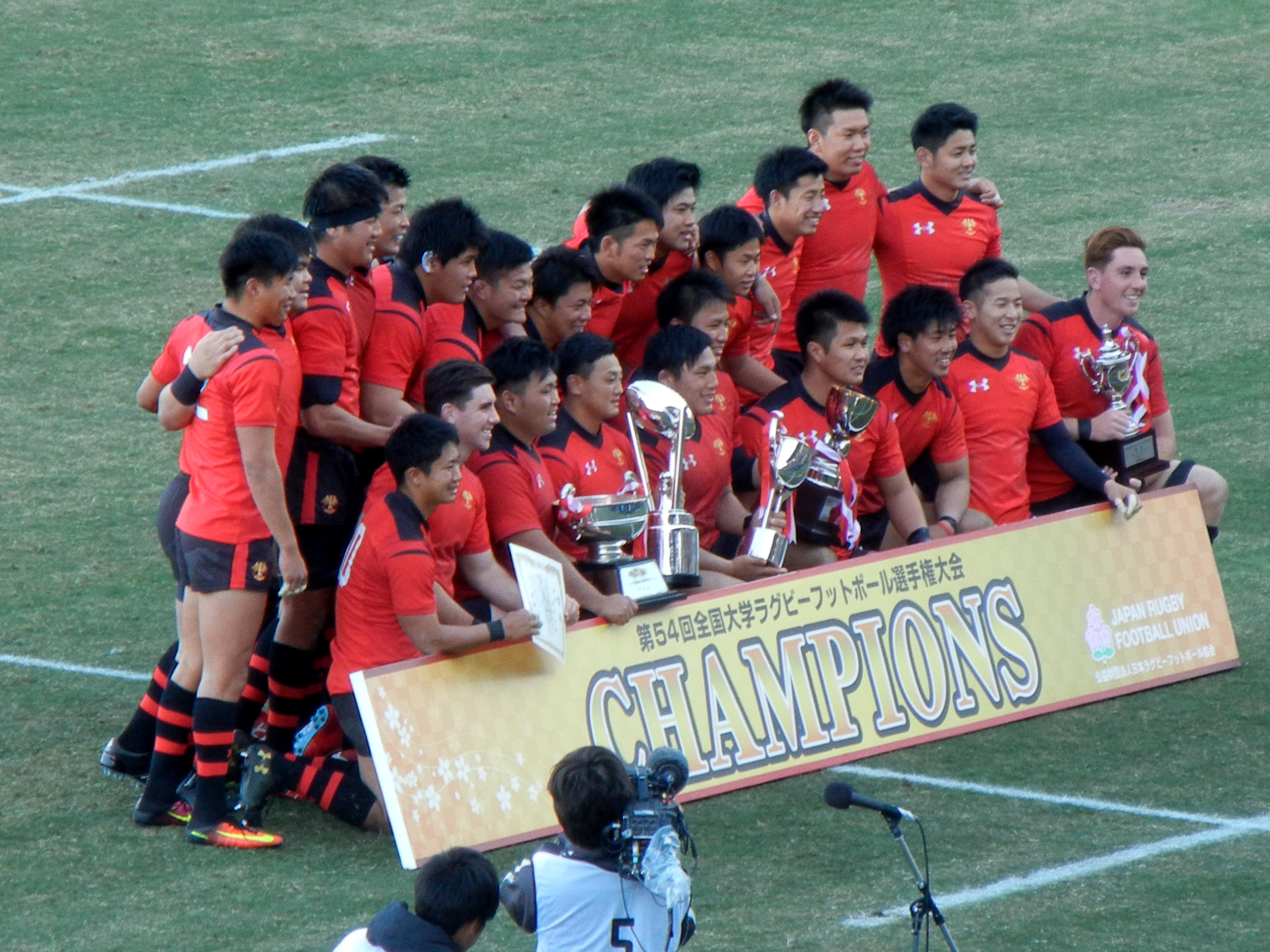 第54回ラグビー大学選手権優勝 帝京大学ラグビー部